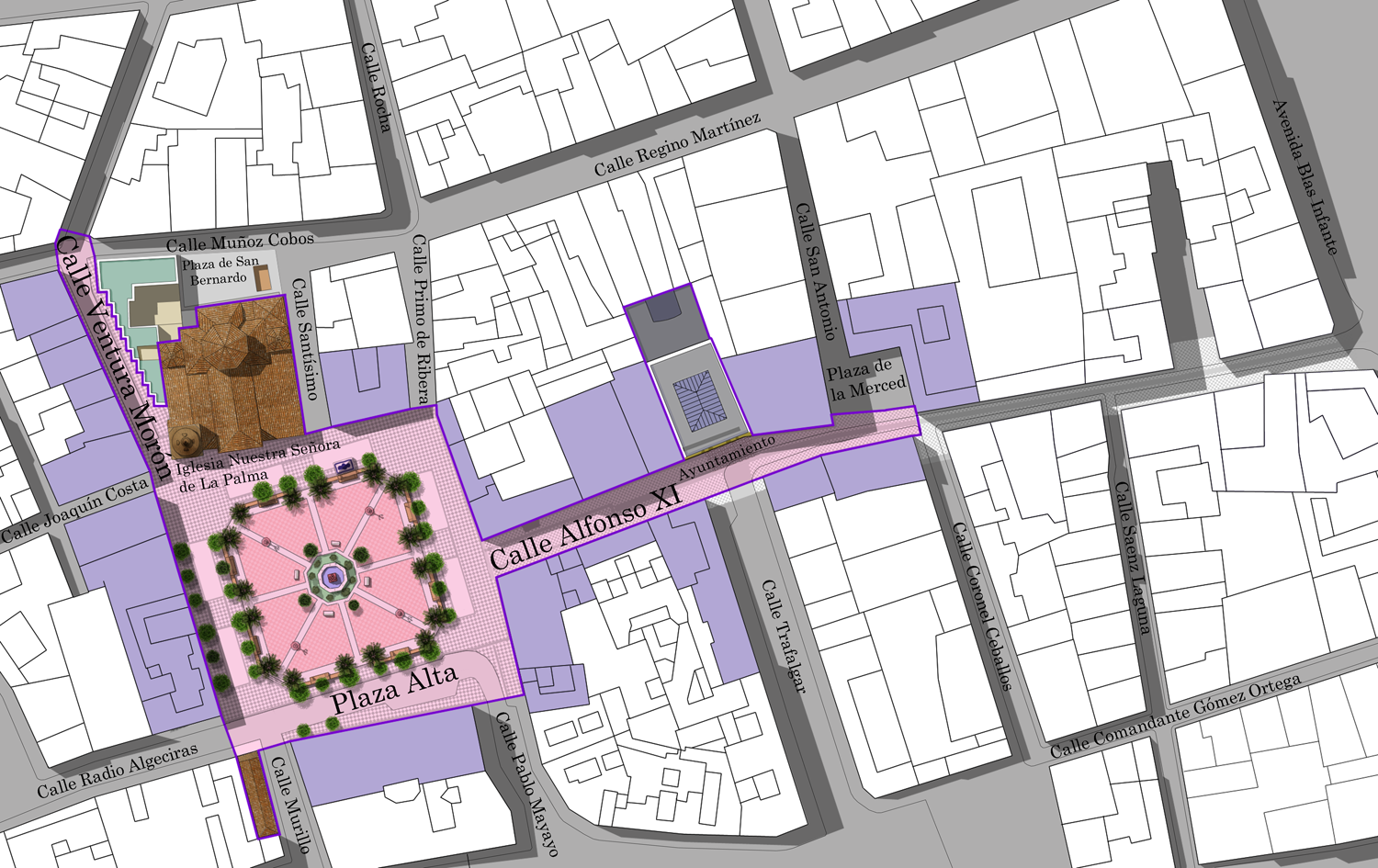 Carrera oficial de la Semana Santa de Algeciras con las calles Alfonso XI, Plaza Alta y Ventura Morón. Algeciras, Andalucía, España.